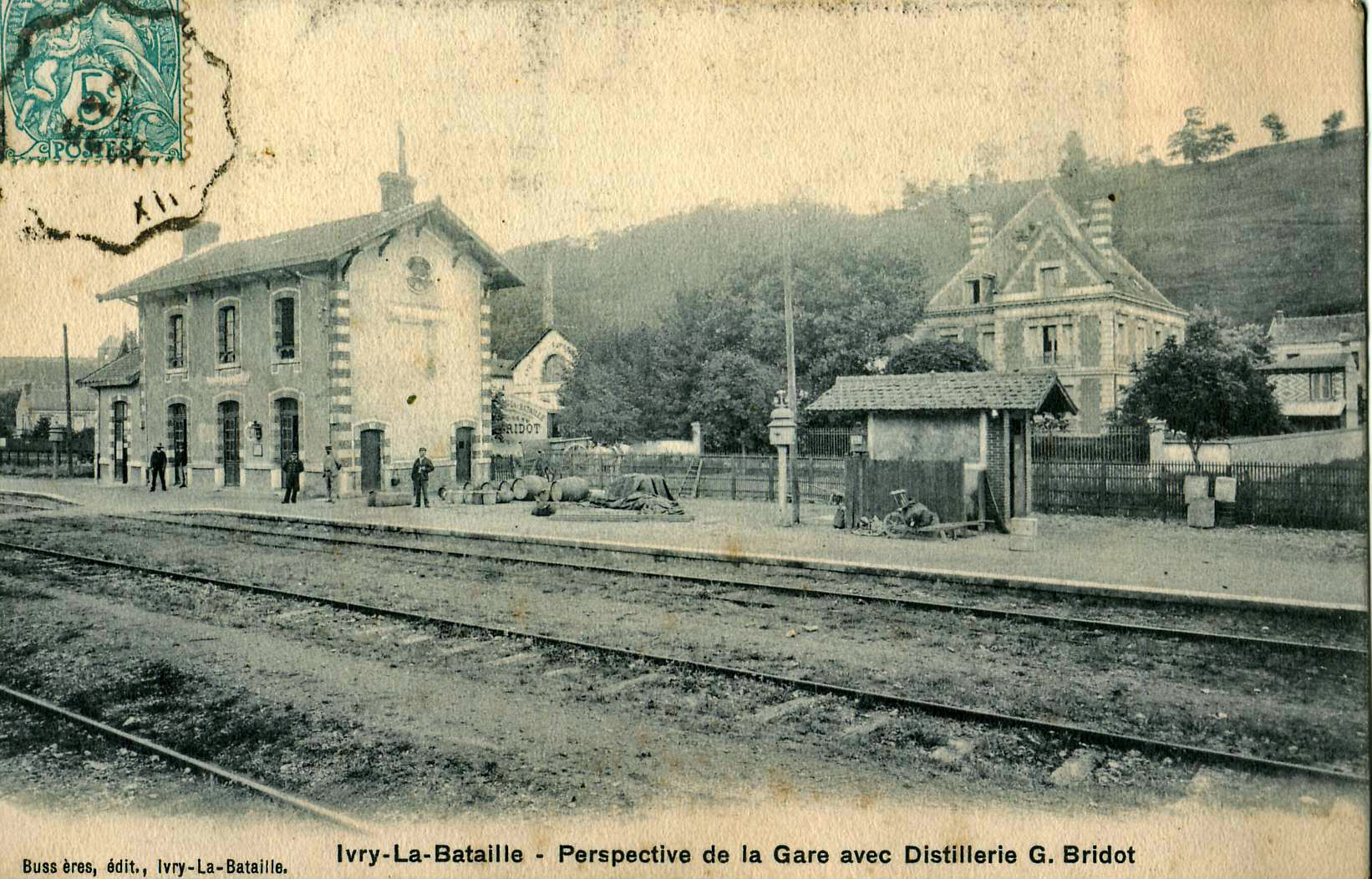 Carte postale ancienne éditée par Bussières à Ivry-la-Bataille : IVRY-LA-BATAILLE - Perspective de la Gare avec Distillerie G. Bridot